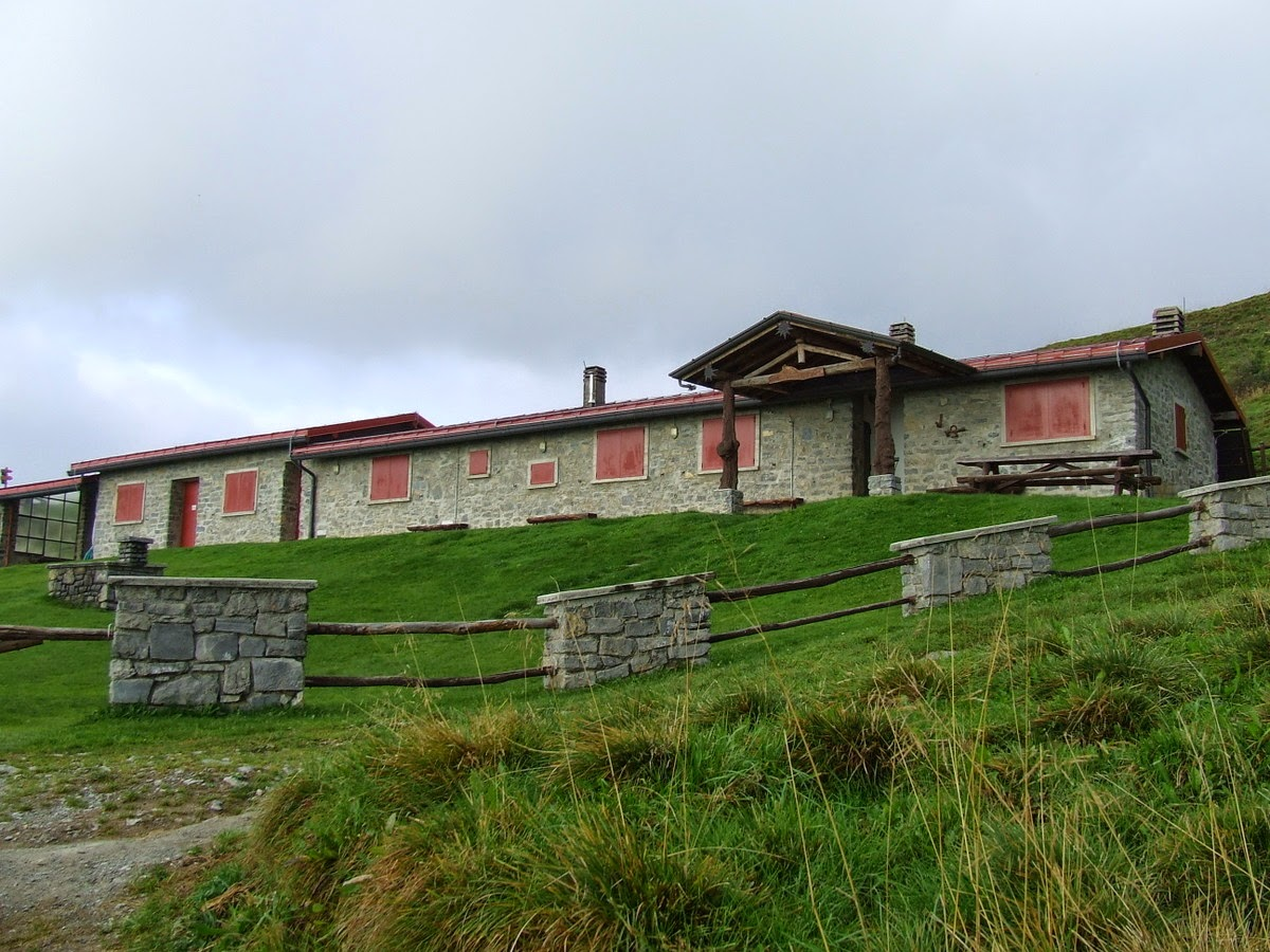 Rifugio Monte Vaccaro, Prealpi Bergamasche (BG)